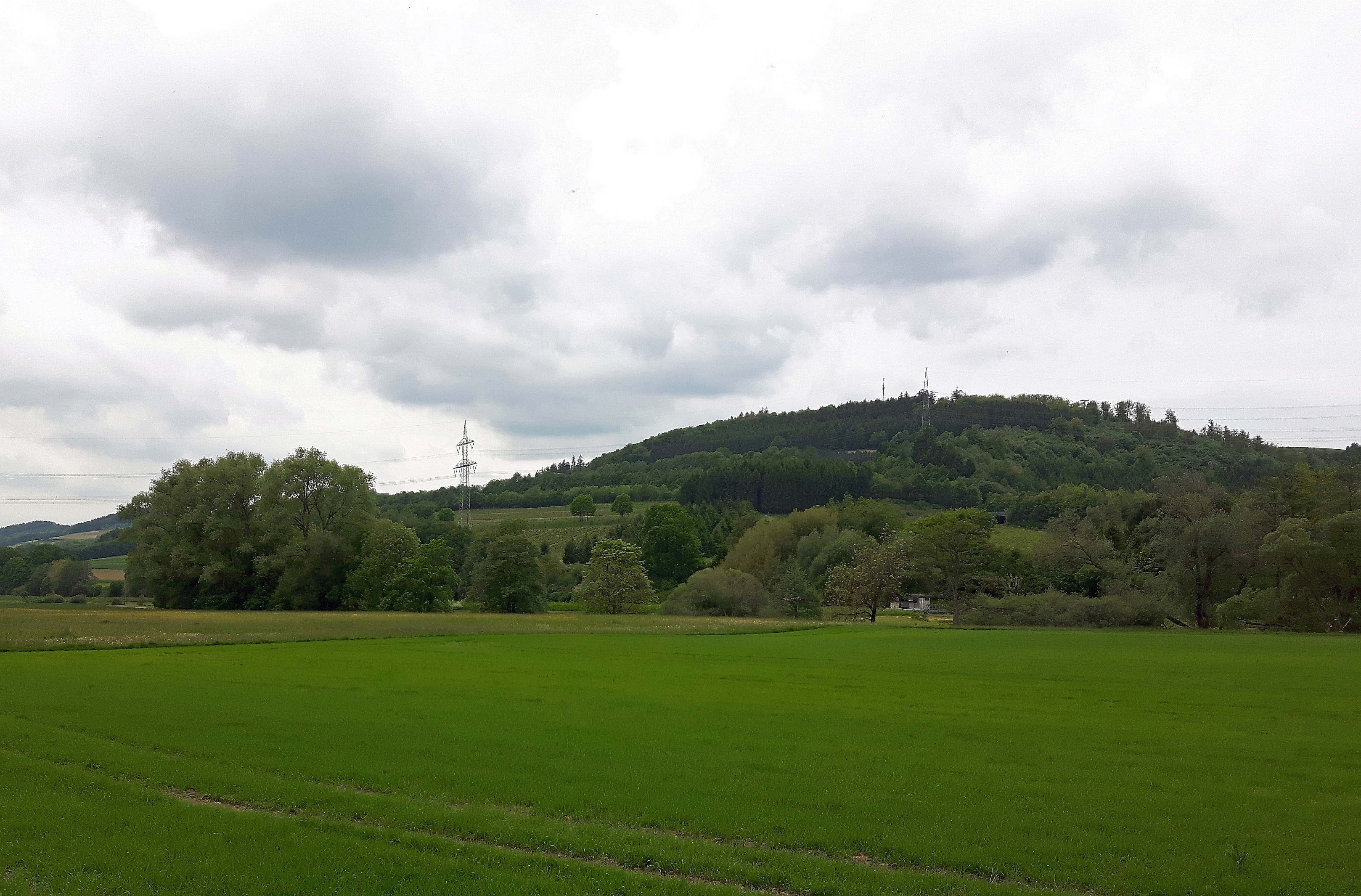 Naturschutzgebiet Bestwiger Ruhrtal (HSK-450) im Talgrund. Waldgebiete gehören nicht zum NSG.